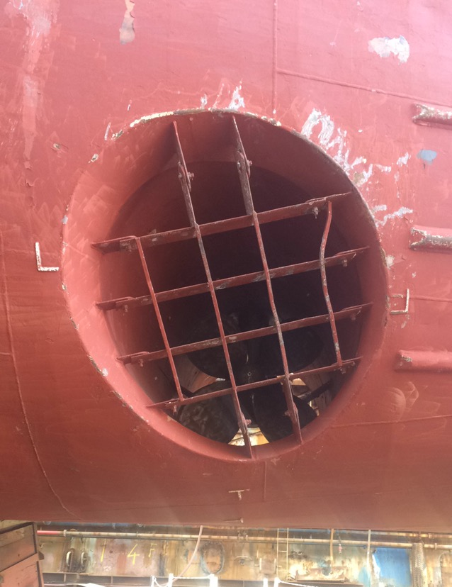 Tunnelthruster som baugpropell på tankskip